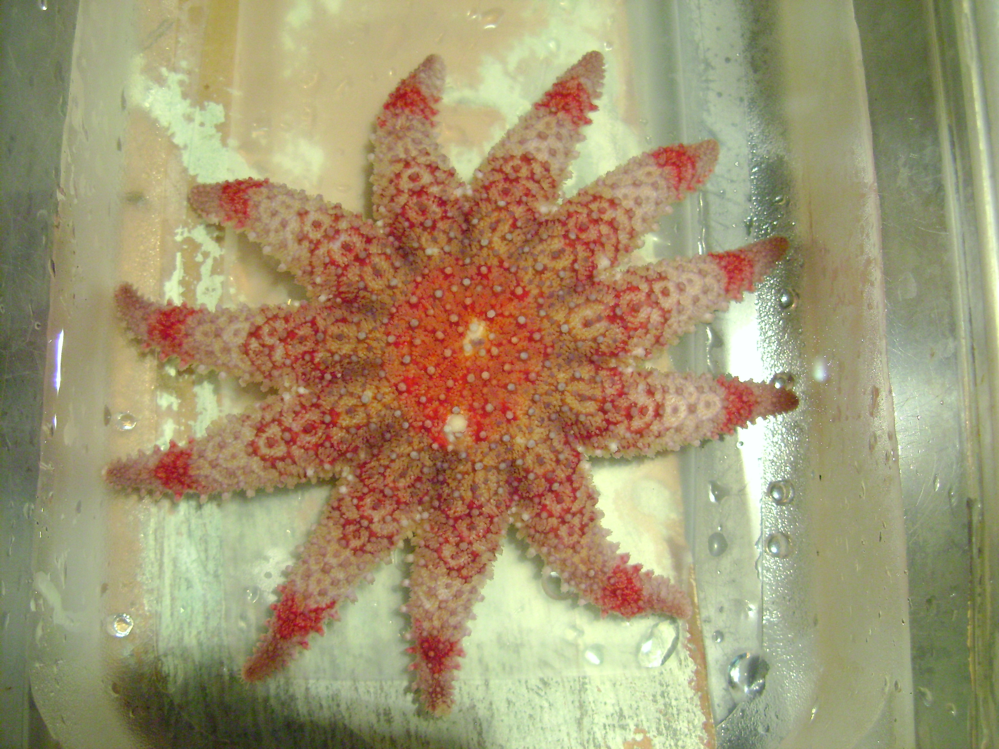 Soleil de mer épineux (solaster à aigrettes, Crossaster papposus), vivant dans le bassin de la Station exploratoire du Saint-Laurent, à Rivière-du-Loup, au Québec